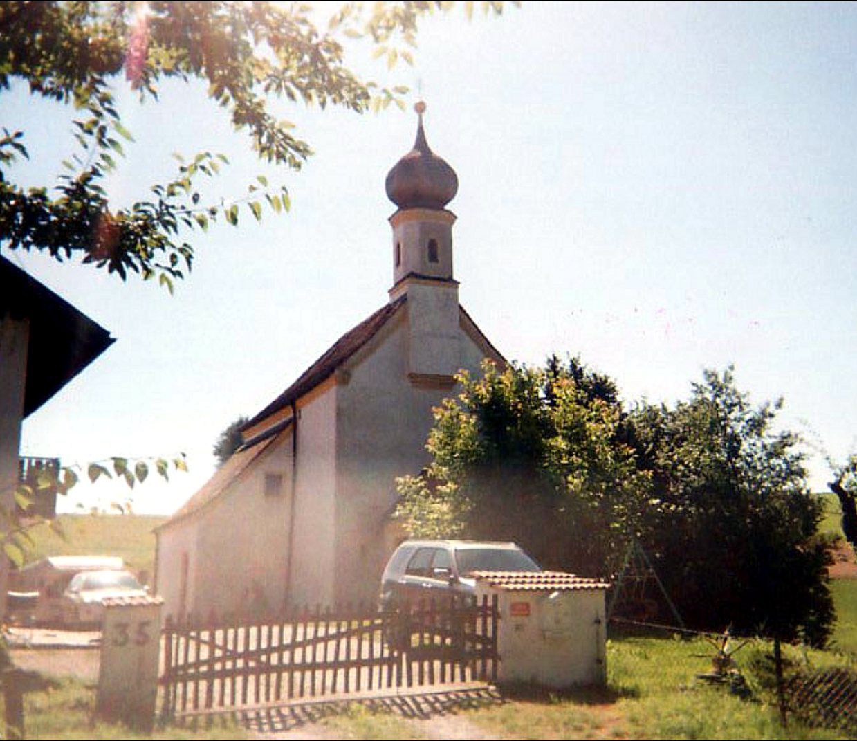 Die ehemalige Schlosskapelle von Steeg